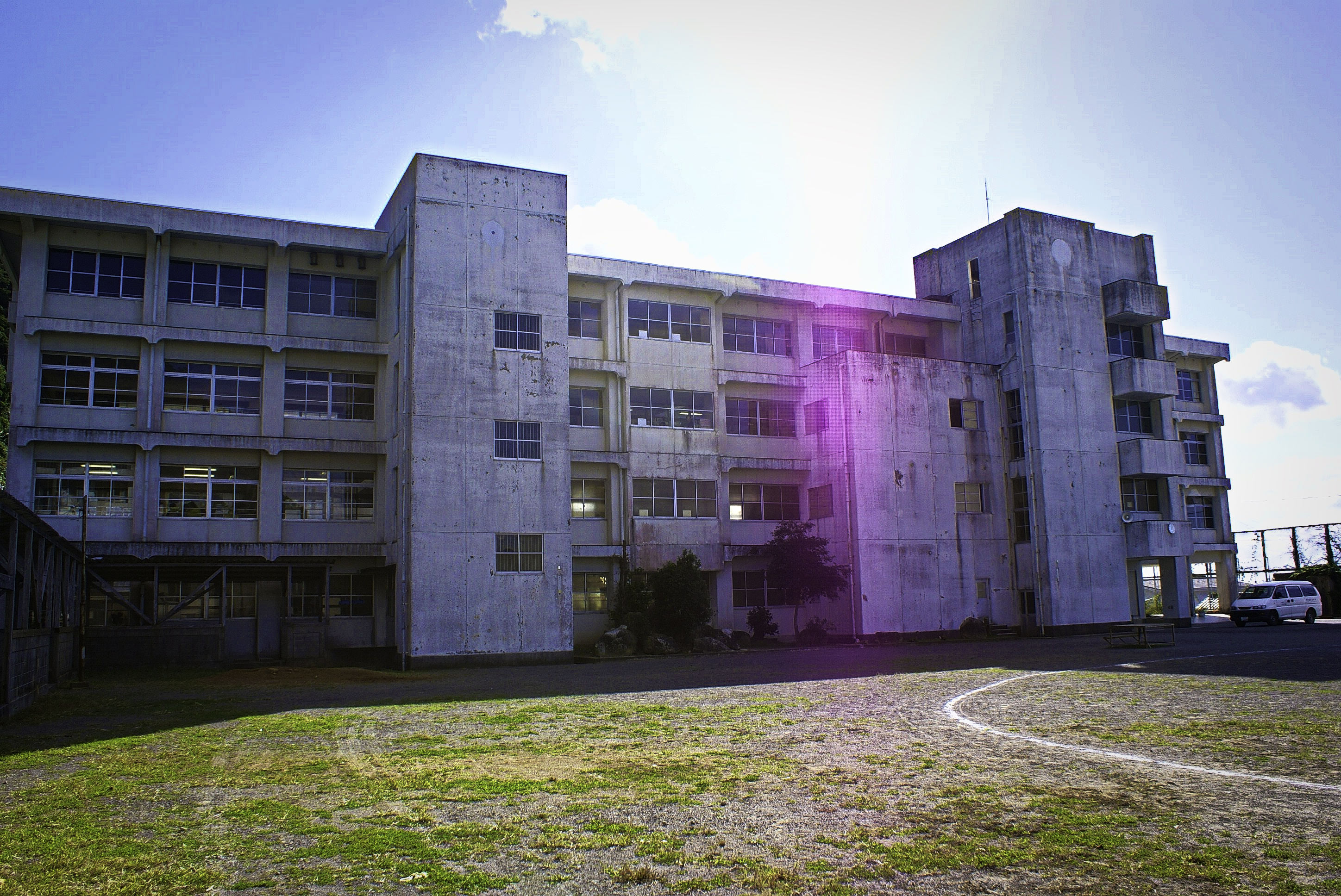 明治６年に開校し昭和３１年のピーク時には８６１人いたが、2018年度で閉校する。現在では４年生と６年生のあわせて９人まで減少していた。